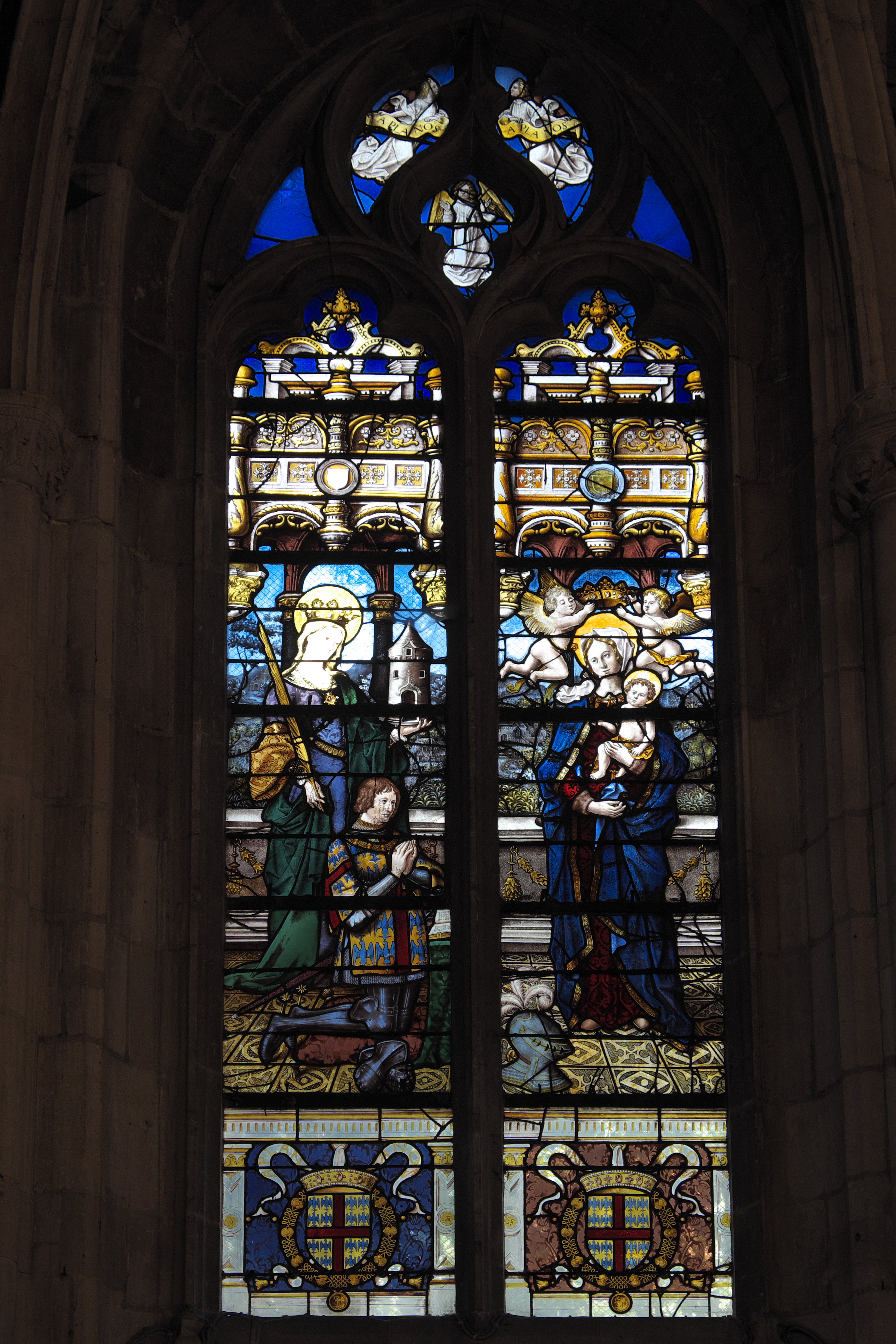 Katholische Pfarrkirche Saint-Martin (Collégiale Saint-Martin) in Montmorency, Bleiglasfenster aus dem 16. Jahrhundert, Darstellung: Anne de Montmorency als junger Mann (in der Mitte kniend), hl. Barbara (links) und Madonna mit Kind (rechts), siehe: Dominique Foussard, Charles Huet, Mathieu Lours: Églises du Val-d'Oise. Pays de France, Vallée de Montmorency. Société d'Histoire et d'Archéologie de Gonesse et du Pays de France, 2. Auflage, Gonesse 2011, ISBN 9782953155426